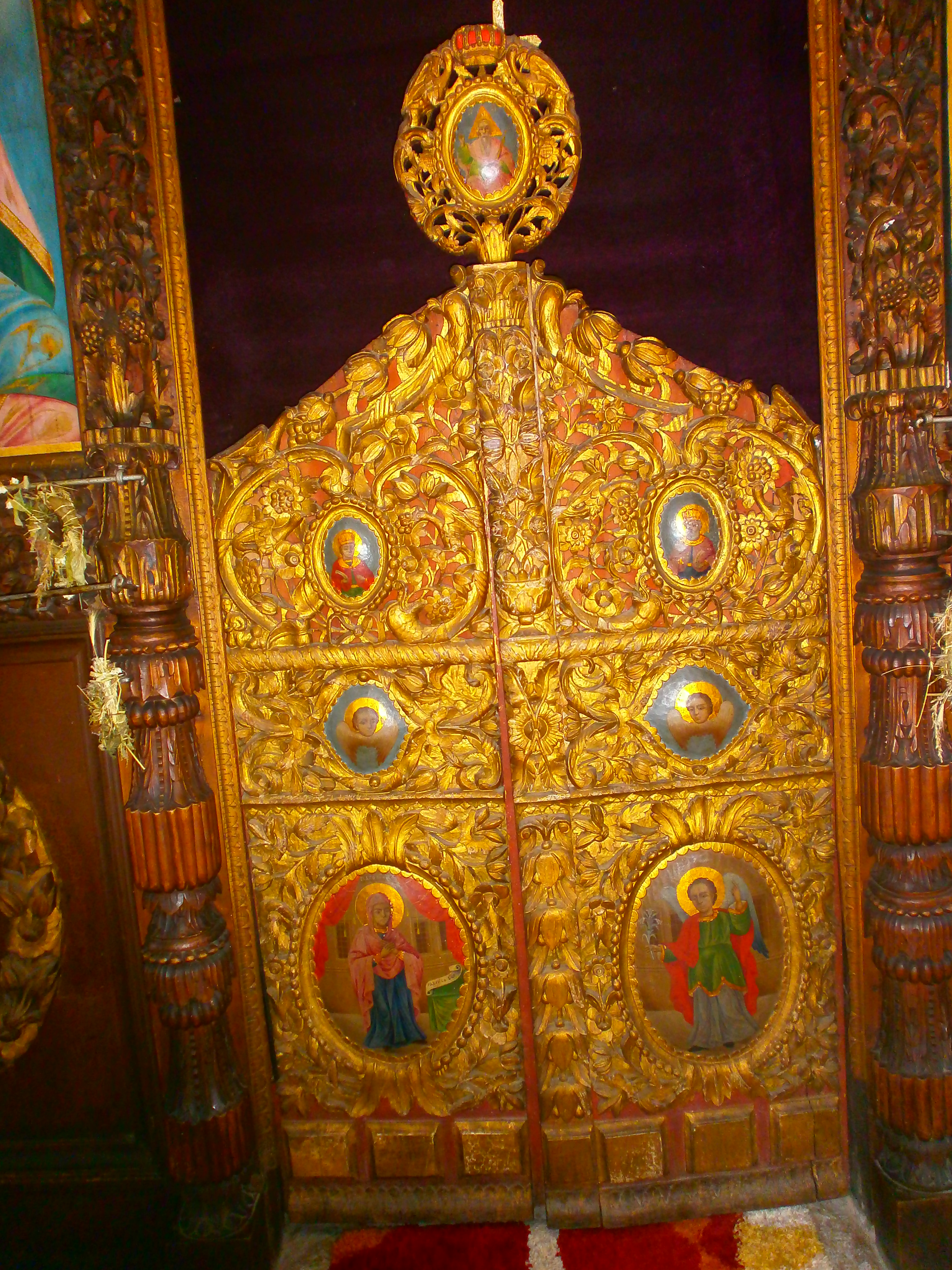 Srpski (latinica): Dimitrovgrad